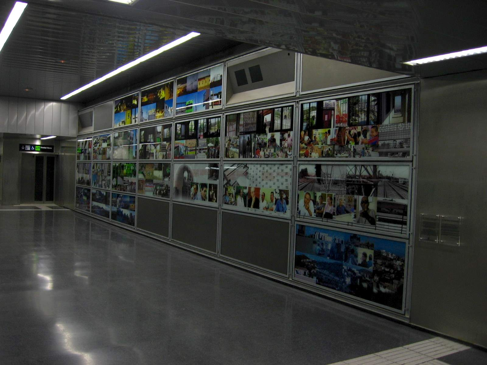 Art in the Torre Baró-Vallbona station, Barcelona Metro/Obra d'art de l'estació Torre Baró-Vallbona, Metro de Barcelona